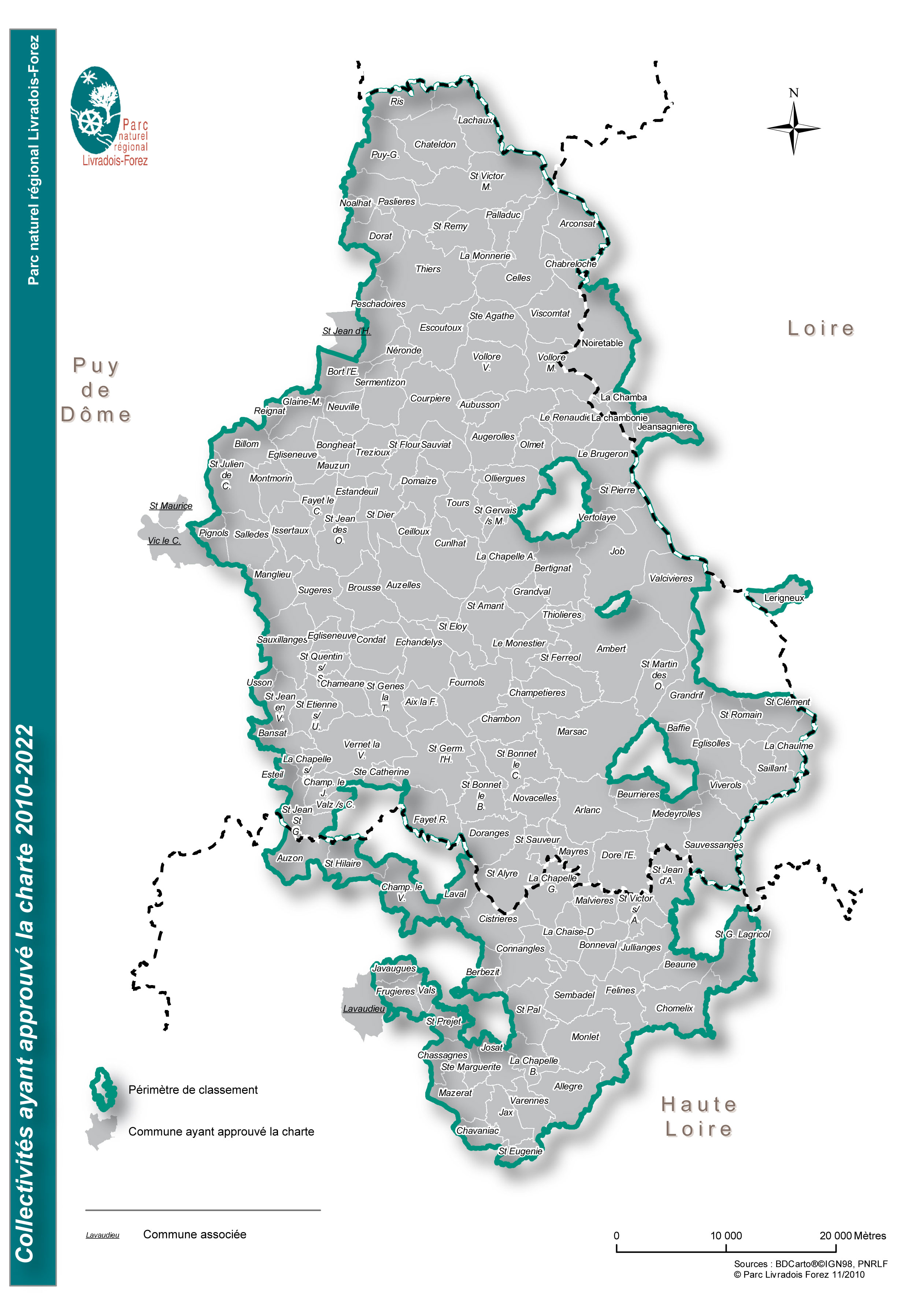 Carte administrative du parc naturel régional livradois-Forez